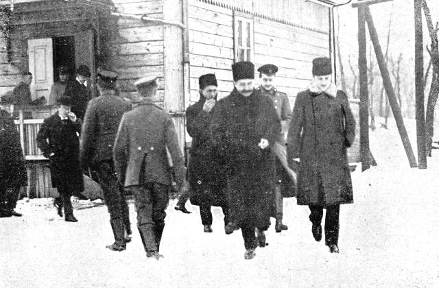 Ukrajinski delegati v Brest-Litovsku.